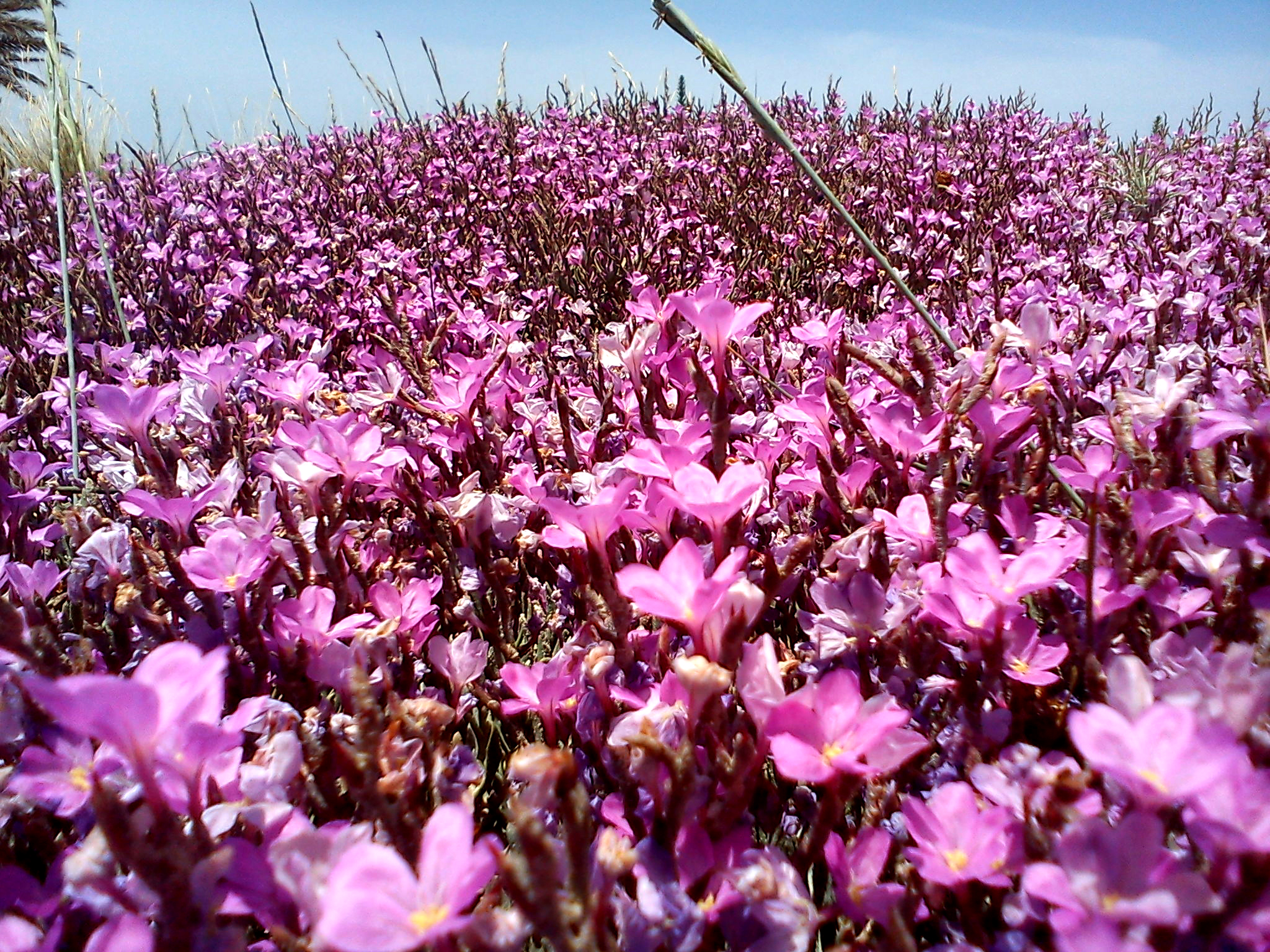 أزهار الحماضة